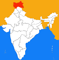 emplacement du Jammu-Kashmir en Inde source : Nataraja statut : Catégorie:Cartes de l'Inde